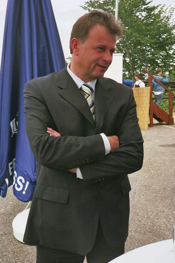 Joachim Paulick, Oberbürgermeister der Stadt Görlitz bei der Fahnenhissung auf der Landeskrone